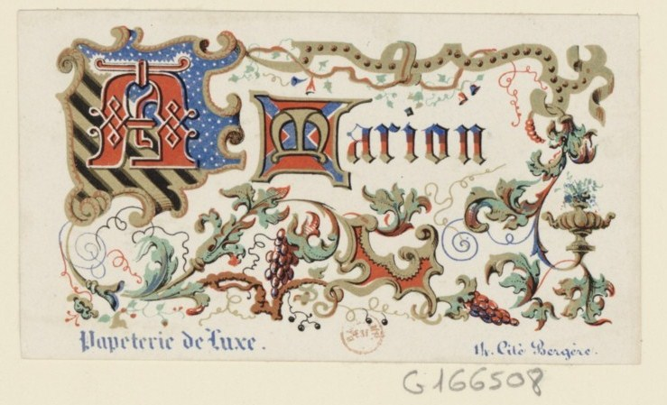 « Carte d'adresse » fabriquée à Paris vers 1842-1845 au nom de A. Marion, Papeterie de luxe, 14 cité Bergère, impression lithographique.